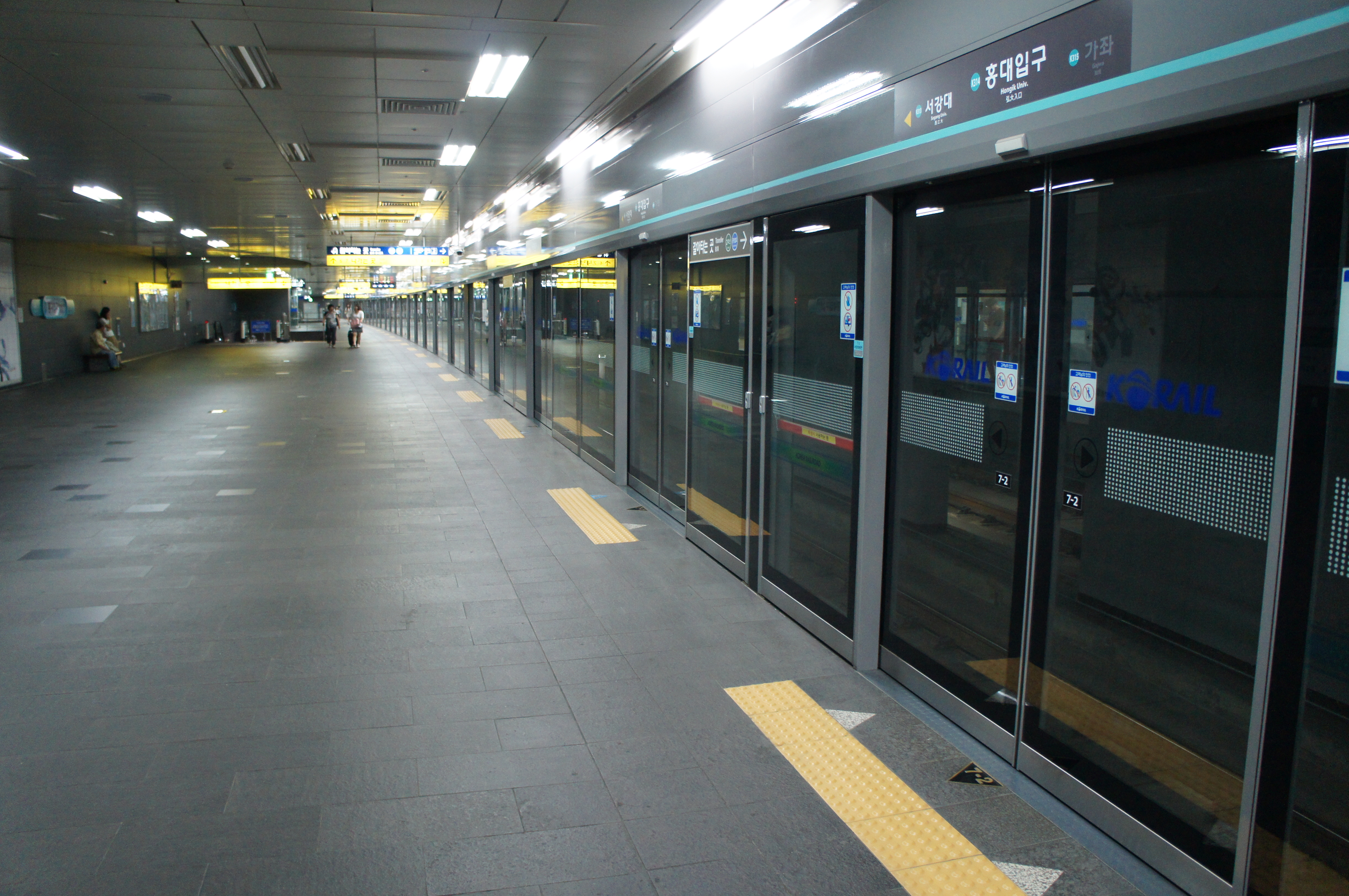 홍대입구역 경의선 승강장